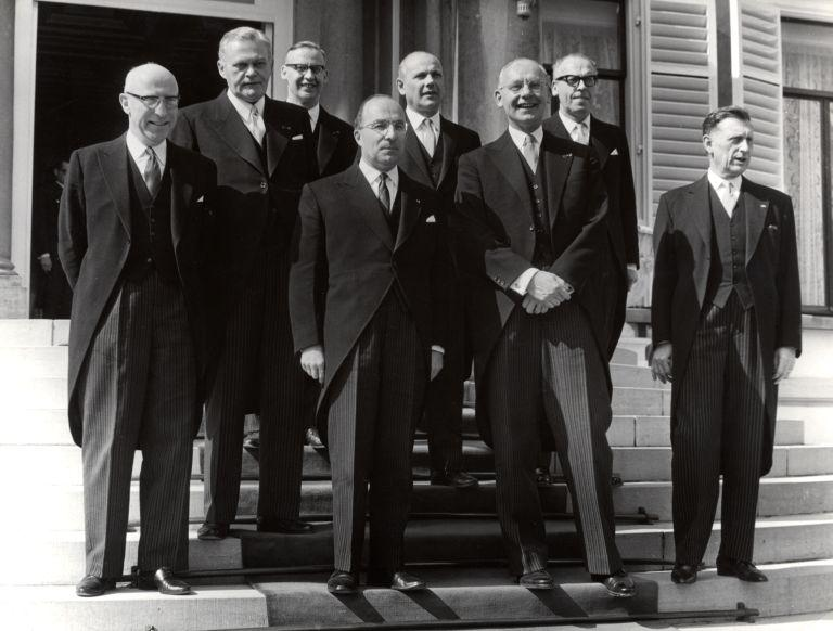 Kabinet Cals (1965-1966) op de trappen van Paleis Soestdijk. V.l.n.r: Samkalden, Smallenbroek, Diepenhorst, Cals, Den Uyl, Vondeling, Vrolijk, Suurhoff. Soestdijk, 14 april 1965.